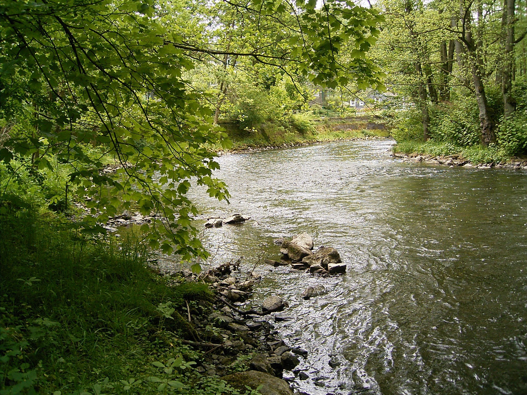 Wupper bei Wupperbrücke Porta Westfalica West in Wuppertal und Schwelm